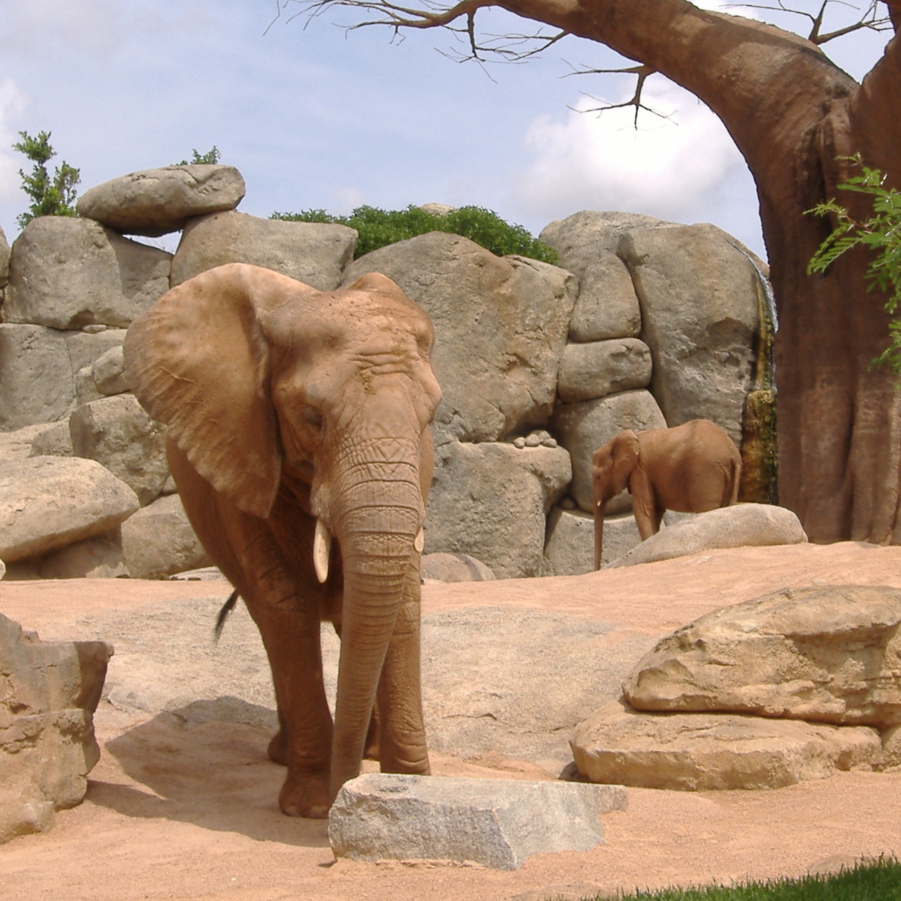 Elefante nel Bioparc di Valencia